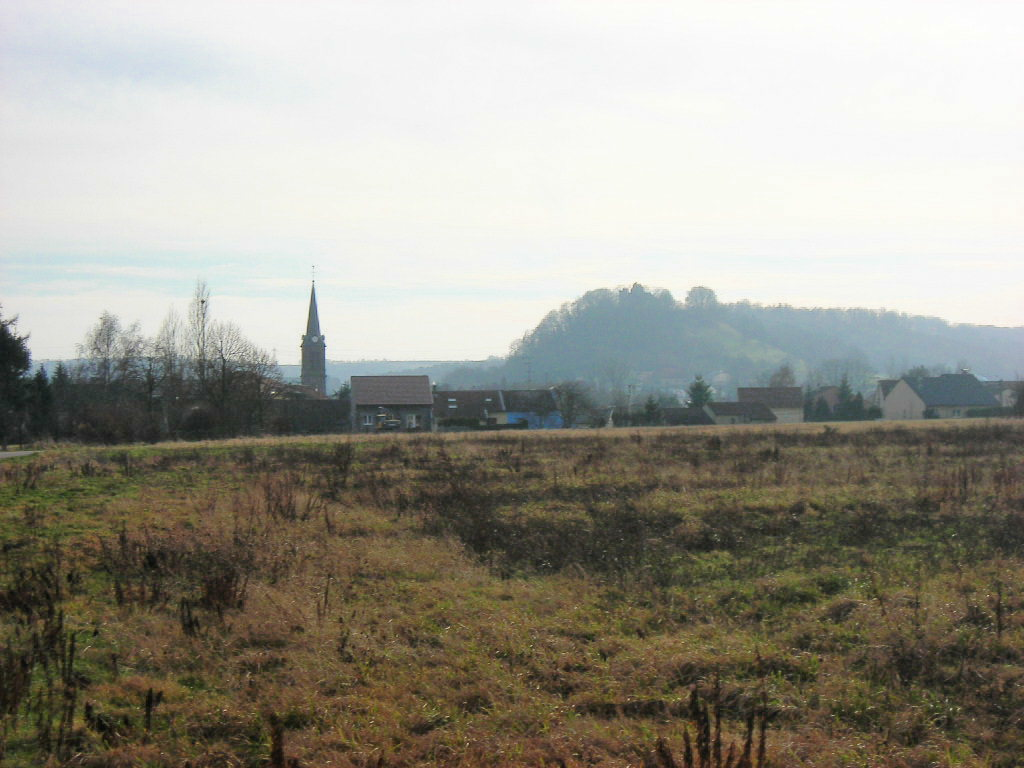 Eglise et château de Ham-sous-Varsberg